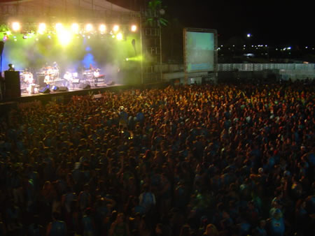 Maceio, BrazilOnibus_maceio2